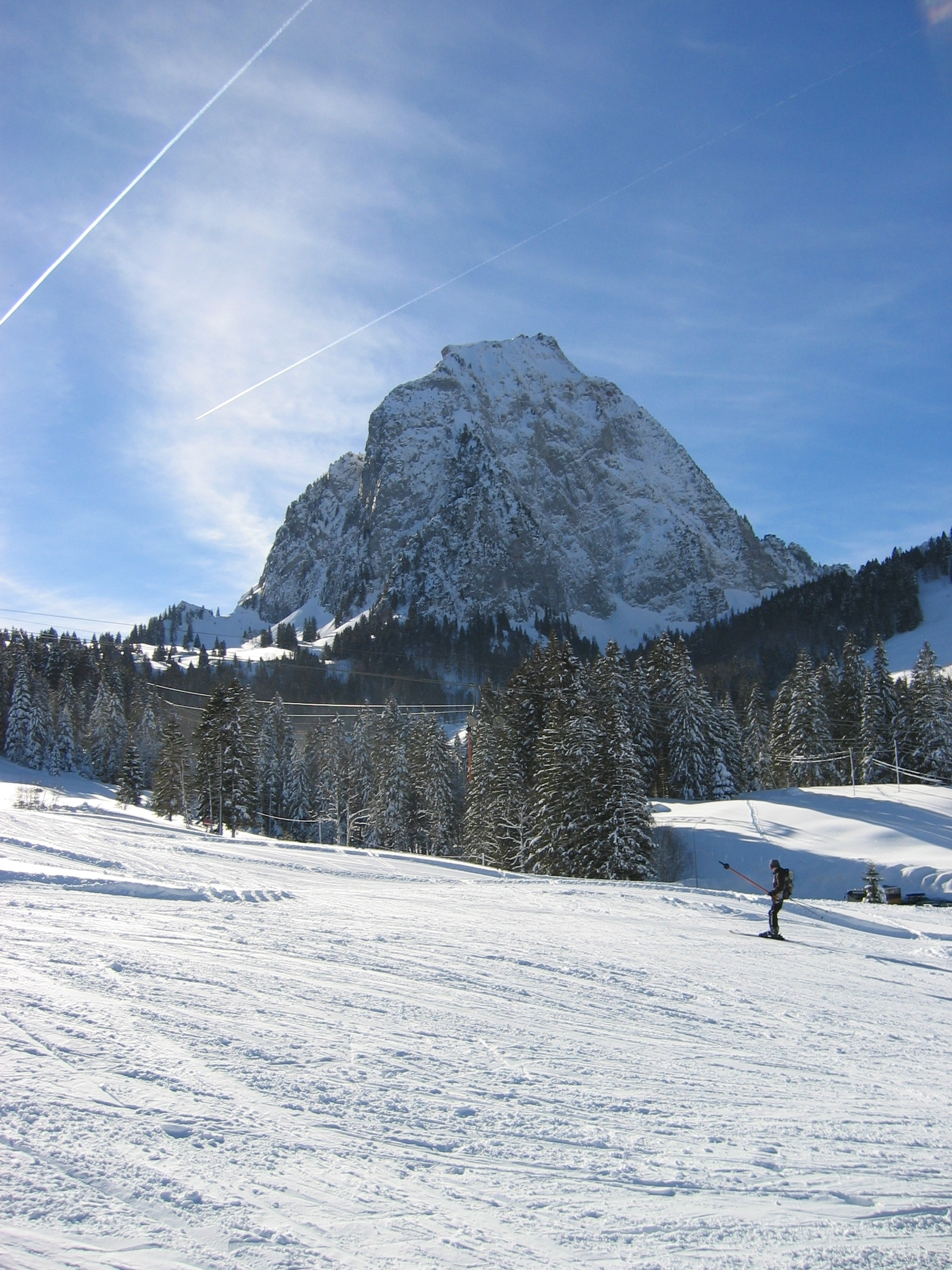 Grosser Mythen fotografiert vom Weiler Brunni